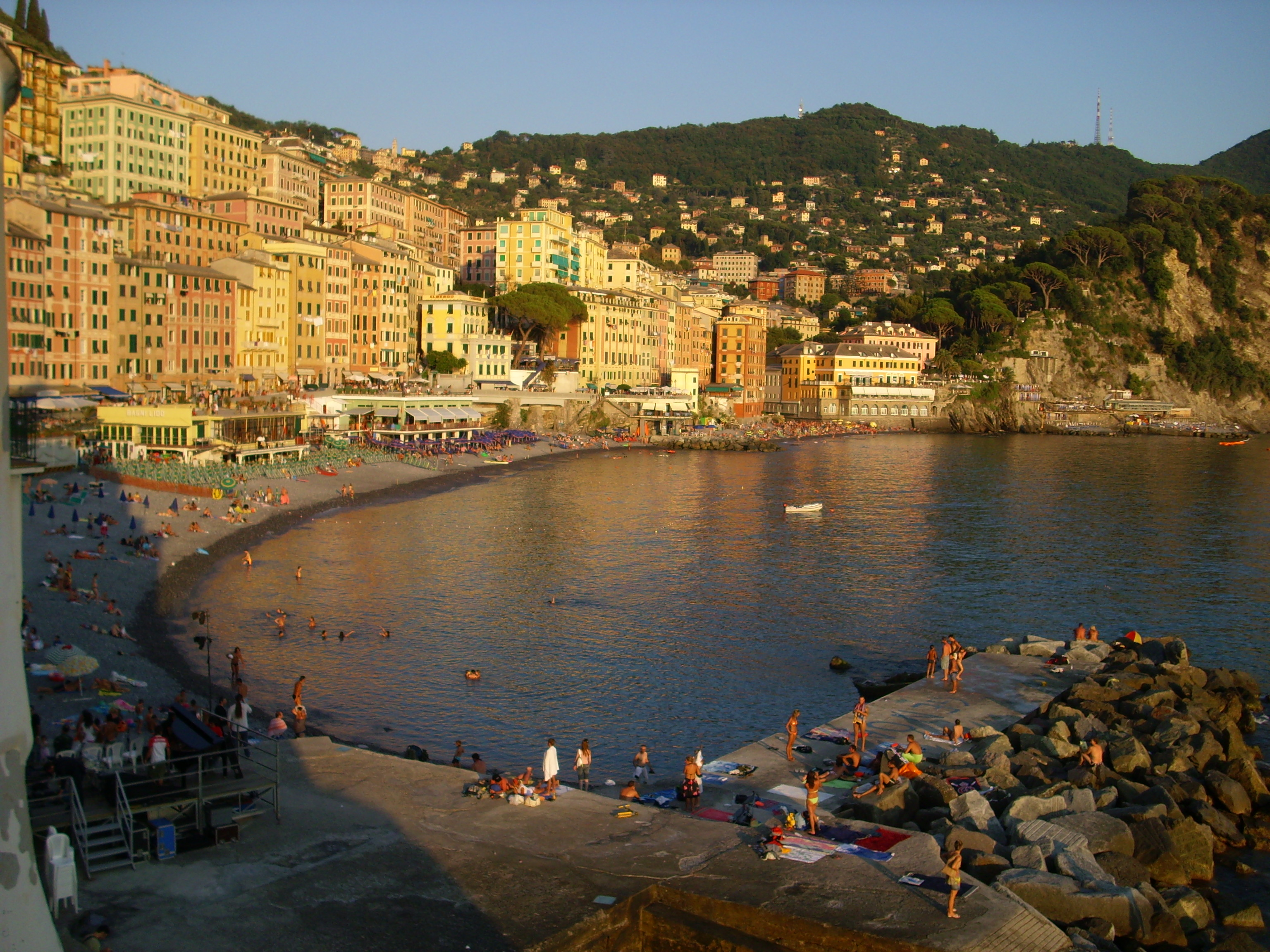 Spiaggia di Camogli